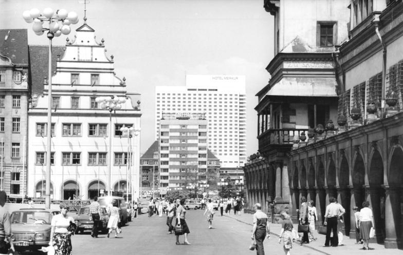 Leipzig, Hotel "Merkur" ADN-ZB 17.6.81 me. DDR: Hotel "Merkur" in Leipzig Anfang März 1981 wurde in Leipzig das neue Interhotel "Merkur" eröffnet. Das etwa 100 Meter hohe Hotel mit 27 Geschossen wurde von dem japanischen Bauunternehmen Kajima Corporation projektiert. Mit rund 450 Zimmern, zehn Restaurants und Bars, fünf Salons und einem Kongreßzentrum zählt das Hotel "Merkur" zur internationalen Spitzenklasse und bietet Attraktionen wie einen japanischen Garten mit Wasserfall, Teichen und Lampiongirlanden sowie das Nationalitätenrestaurant ""Sakura"". Reporter: Gahlbeck Copyright: ADN-Zentralbild Berlin-DDR